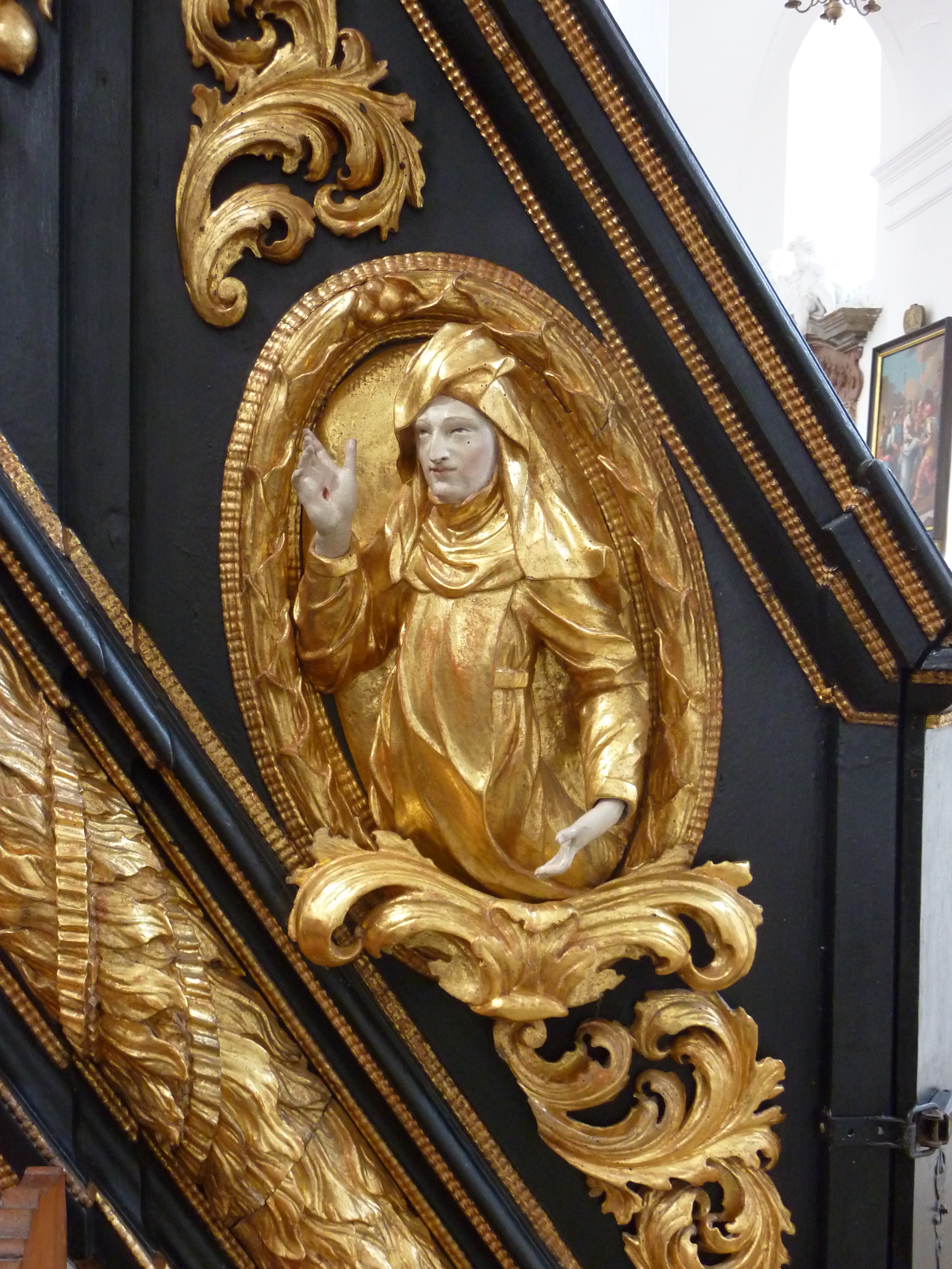 Pfarrkirche Mariä Himmelfahrt, ehem. Zisterzienserstiftskirche, Stift Baumgartenberg, Oberösterreich - Relief hl. Lukardis von Oberweimar an der Kanzel